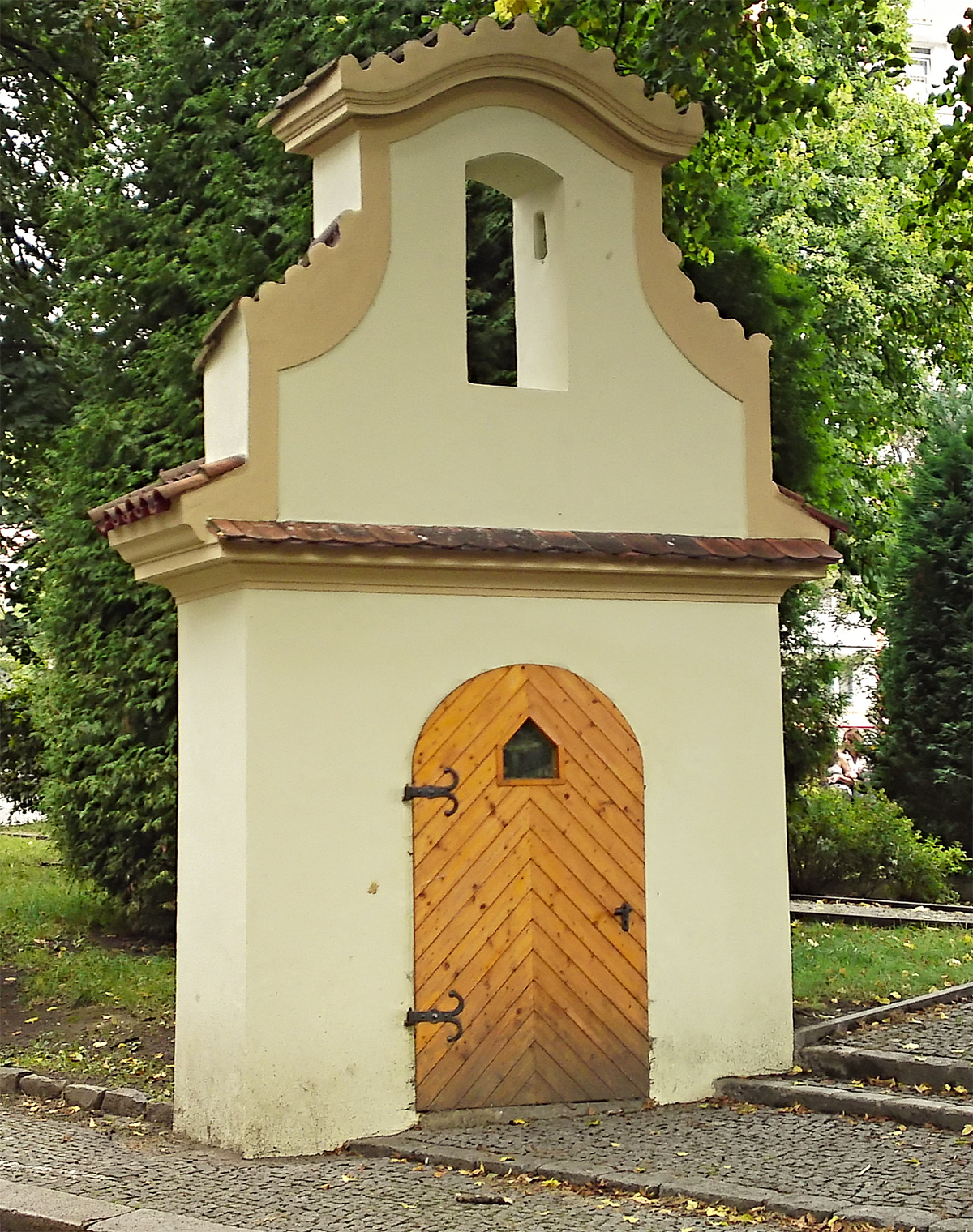 Kaplička (Neštěmice), Neštěmice